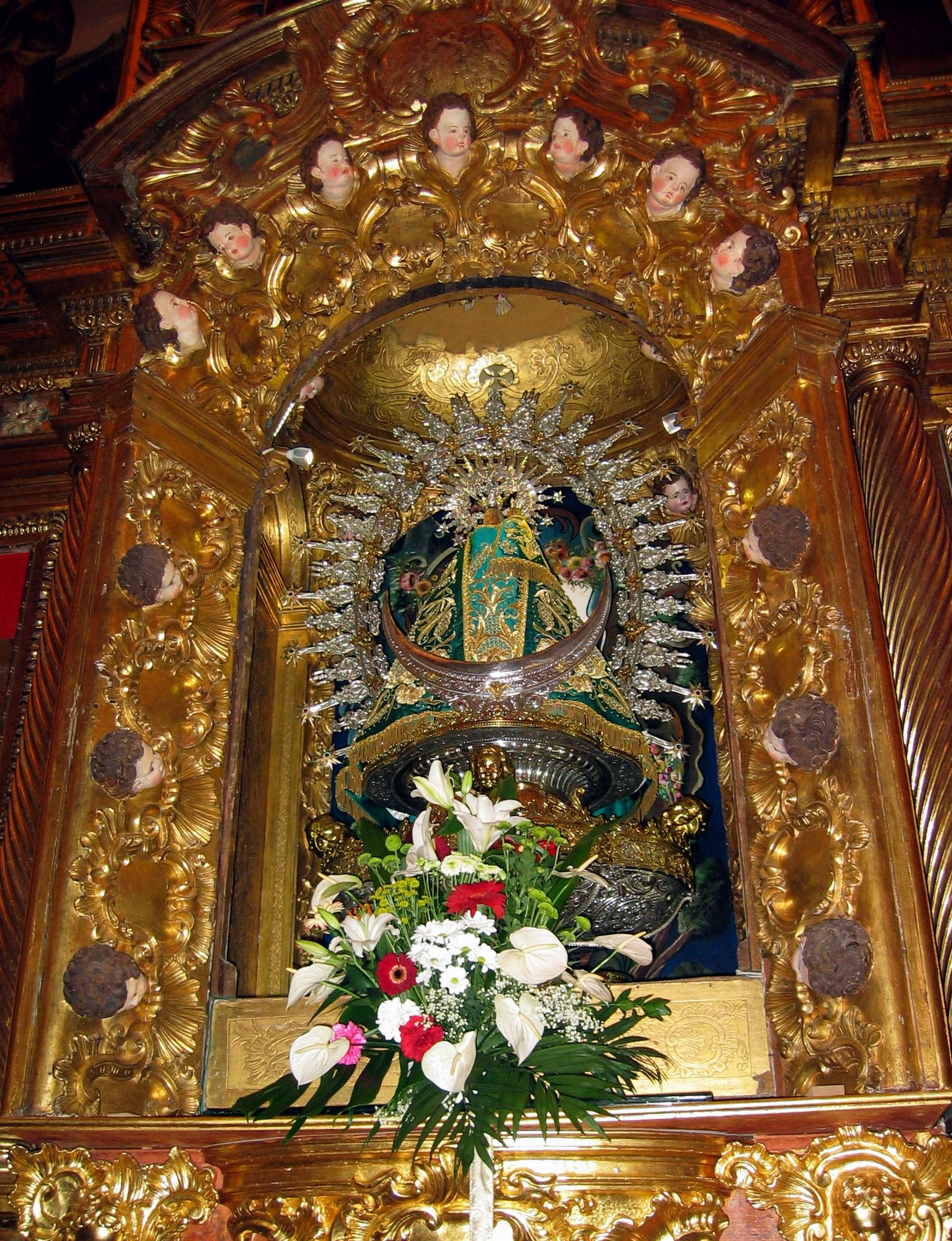 Detalle de la Virgen de Tejeda en la iglesia del Monasterio de Tejeda, Garaballa (Cuenca).